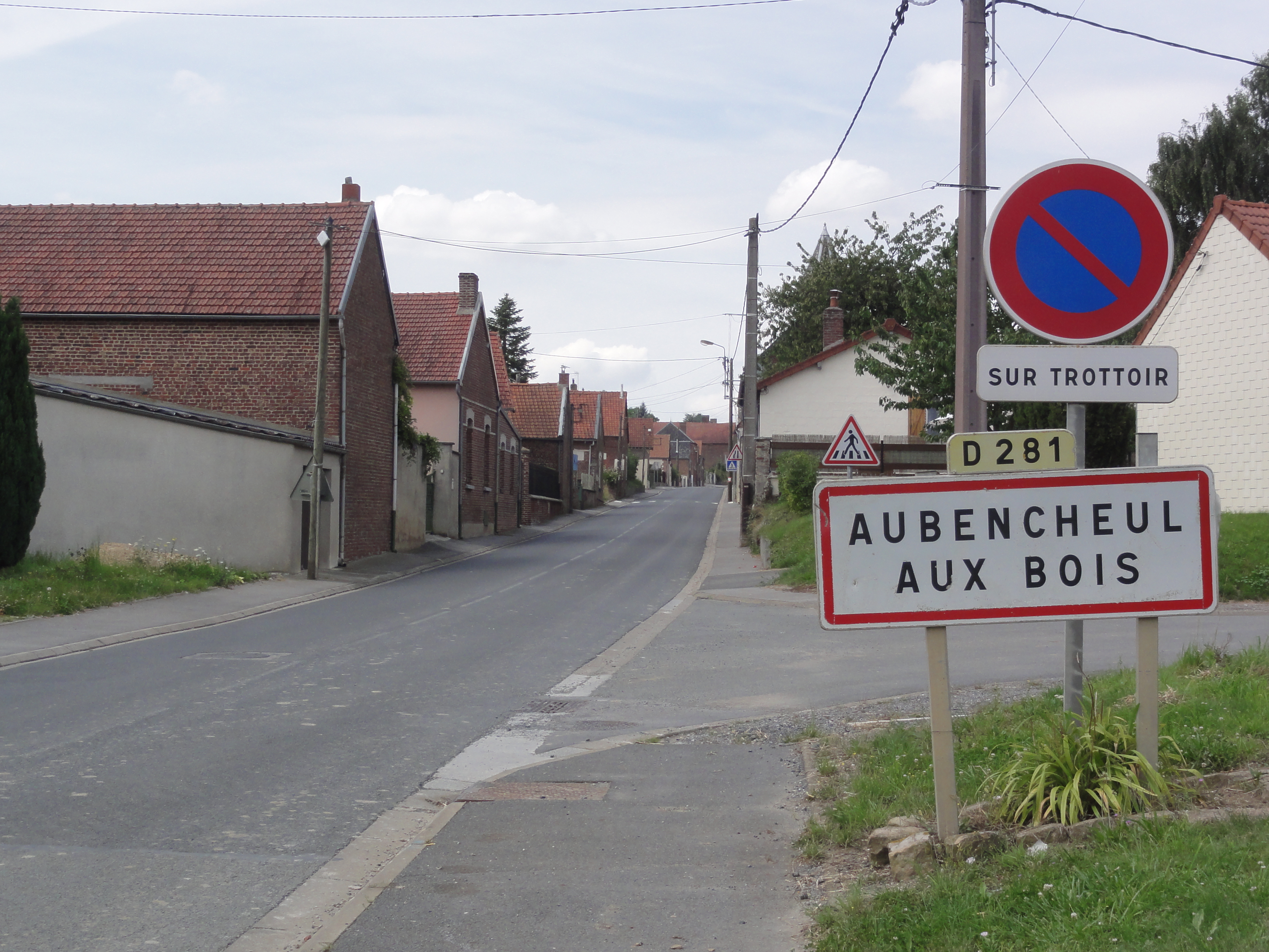 Aubencheul-aux-Bois (Aisne) city limit sign